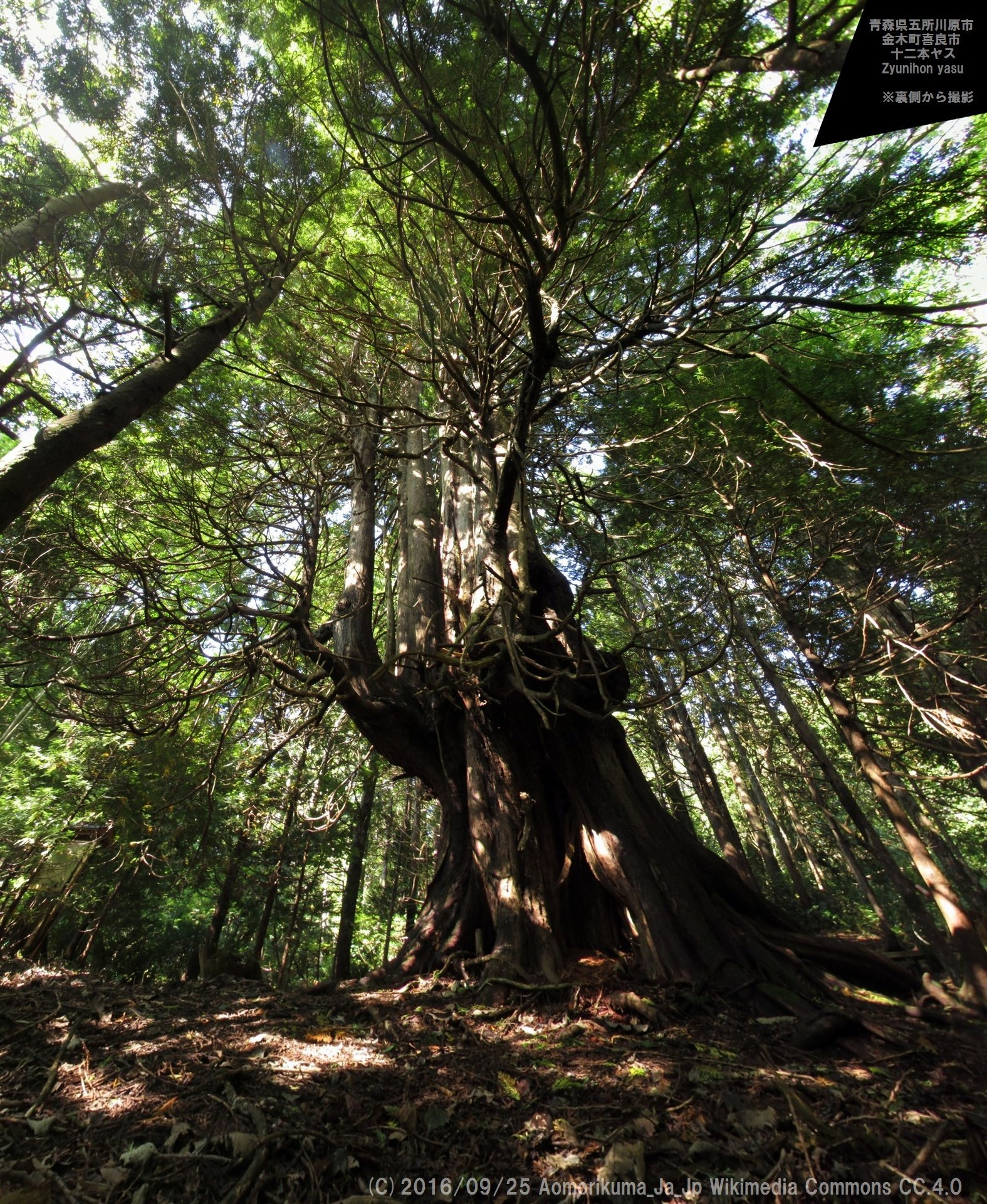 青森県五所川原市金木 十二本ヤス（樹齢８００年以上）ヒノキアスナロ（ヒバ）